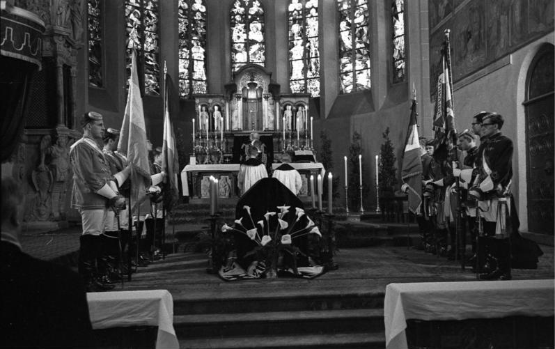 Requiem für den verstorbenen Bonner Polizeipräsidenten Dr. Wilhelm Tegethoff Bonn, Münsterkirche